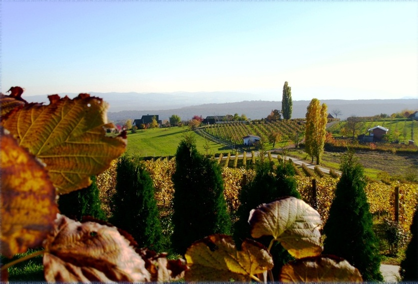 Vinogradi